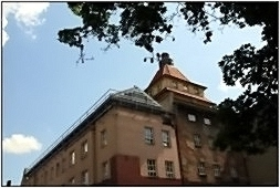 Budynek Wydziału Biologii i Ochrony Środowiska Uniwersytetu Śląskiego, ul. Jagiellońska 28, Katowice